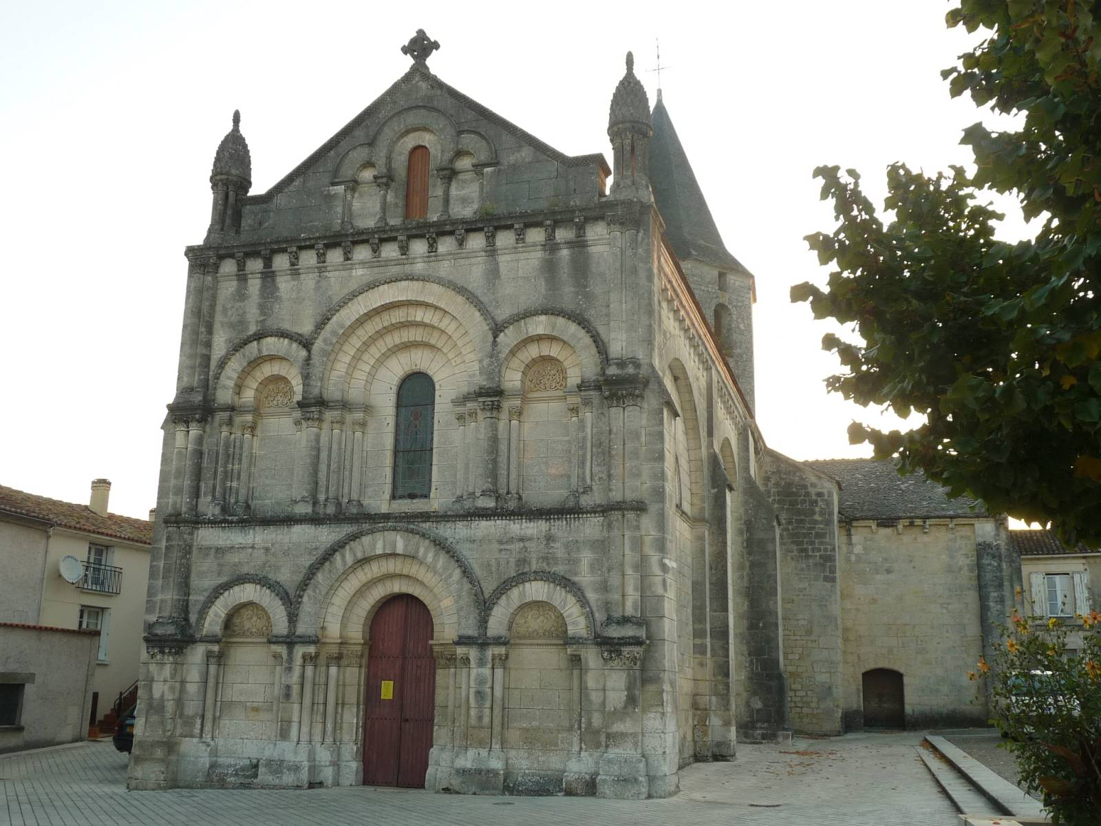 église de Champniers (16), France